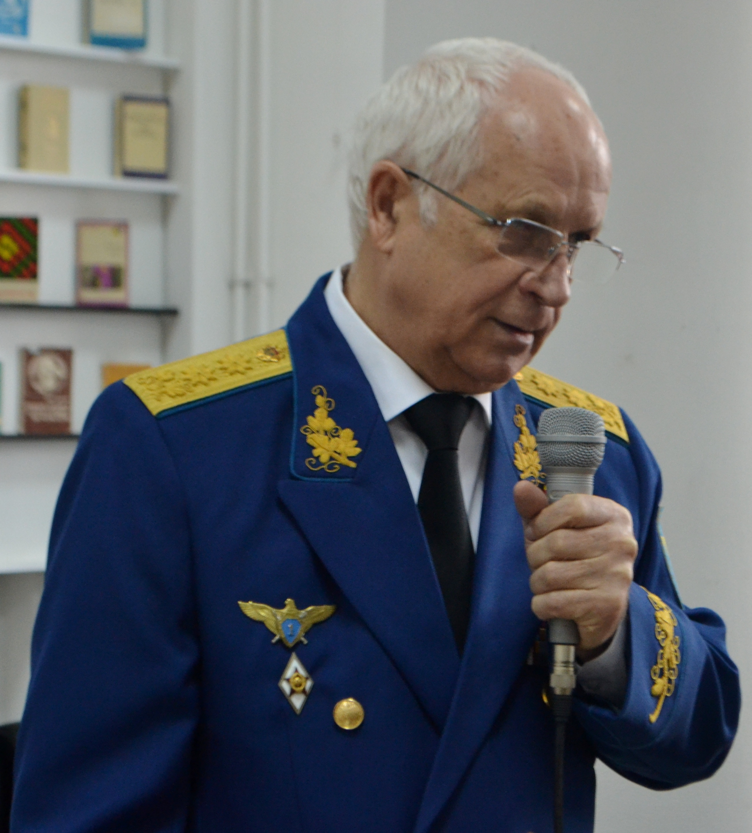 Întâlnire cu personalități "Ion Costaş, primul Ministru al Apărării al RM: Conflictul transnistrean - un război nedeclarat" Biblioteca Centrală, 02.03.2016